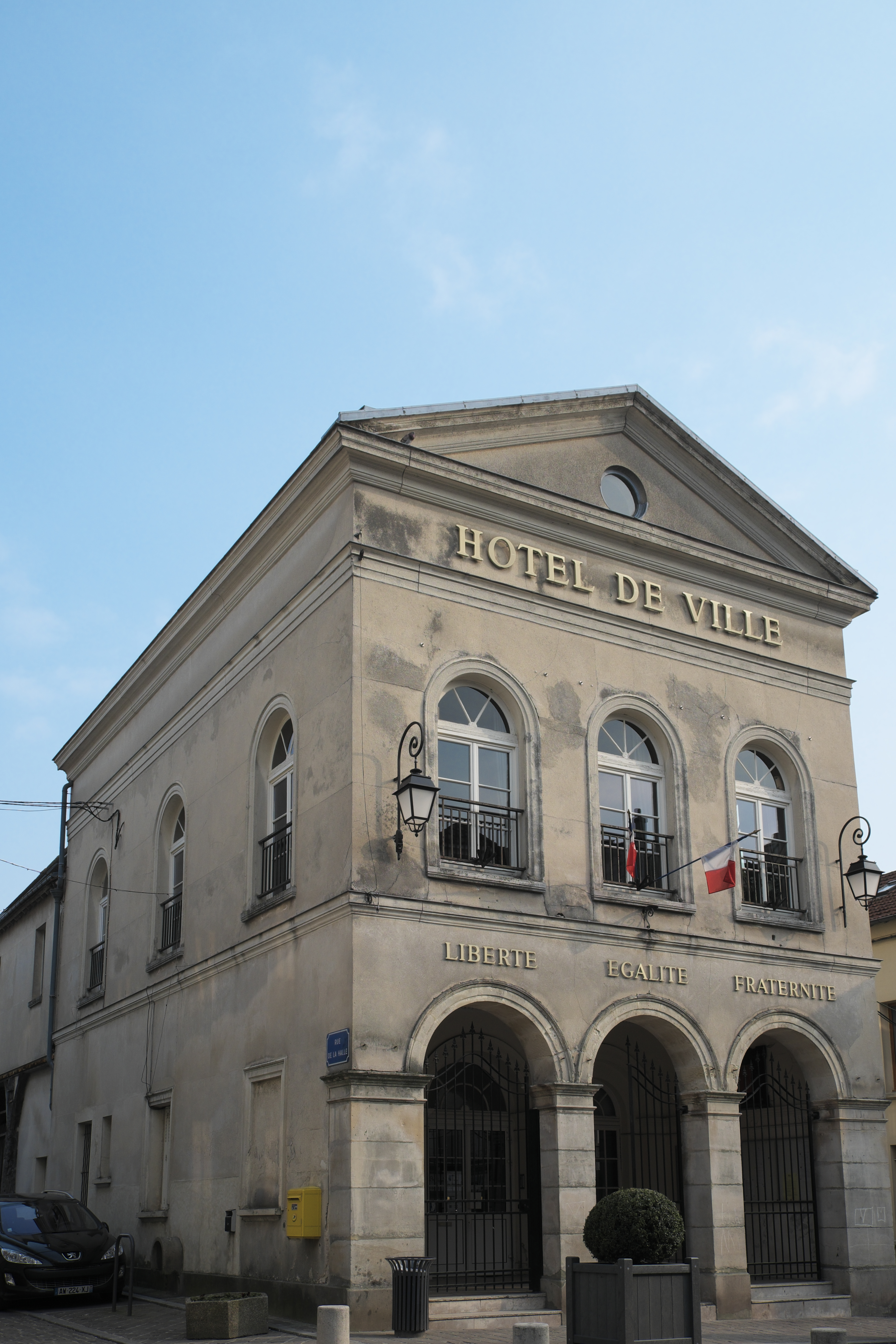 Rathaus, Hôtel de Ville, in Dammartin-en-Goële im Département Seine-et-Marne (Région Île-de-France/Frankreich)